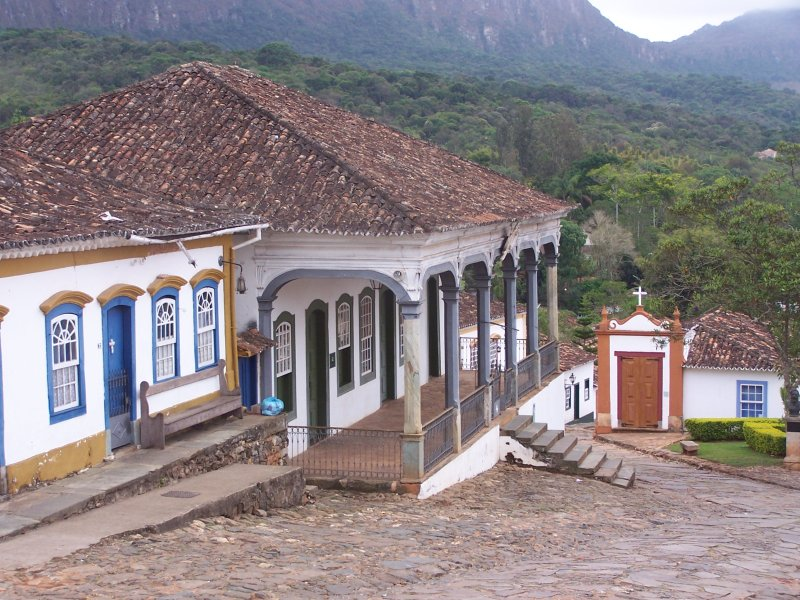 Câmara Municipal, Tiradentes - MG, Brasil.